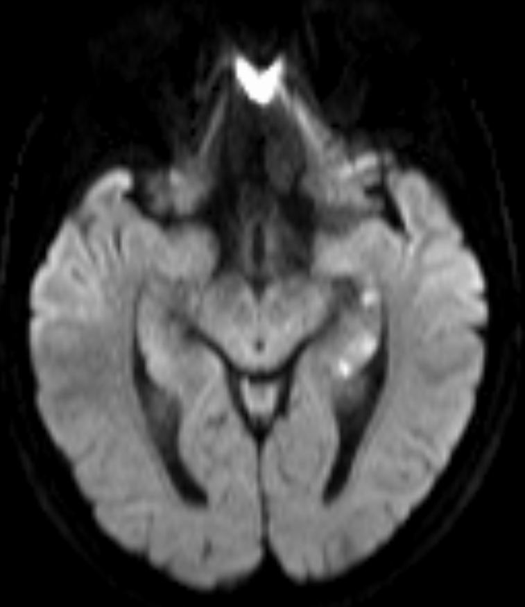 Transiente globale Amnesie (TGA) in der Magnetresonanztomographie DWI axial. Man erkennt die punktförmigen Diffusionsstörungen im Hippocampus links.